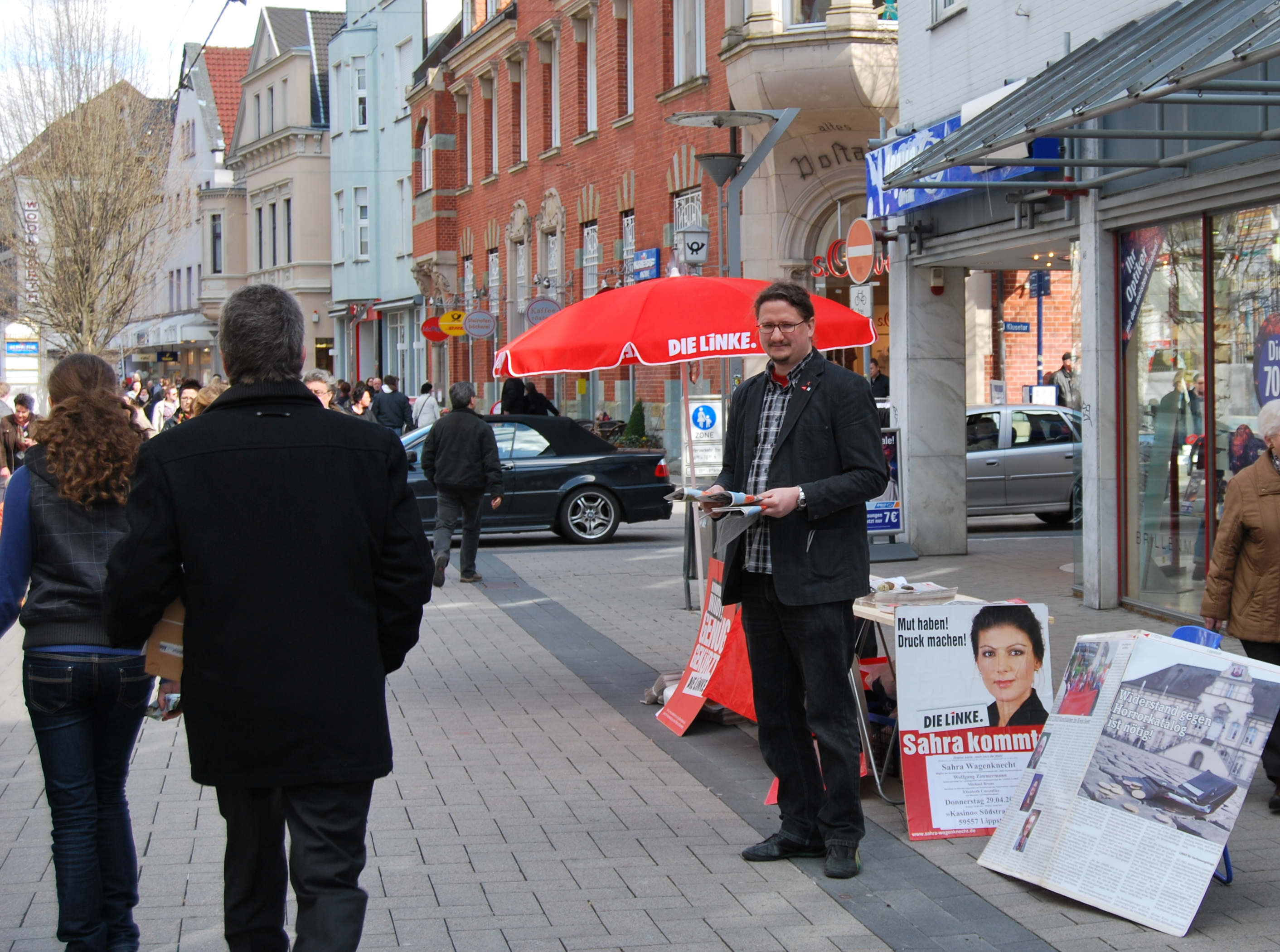 DIE LINKE. Ortsverband Lippstadt startete am Karsamstag 3. April 2010 den Straßenwahlkampf zur Landtagswahl am 9. Mai 2010.